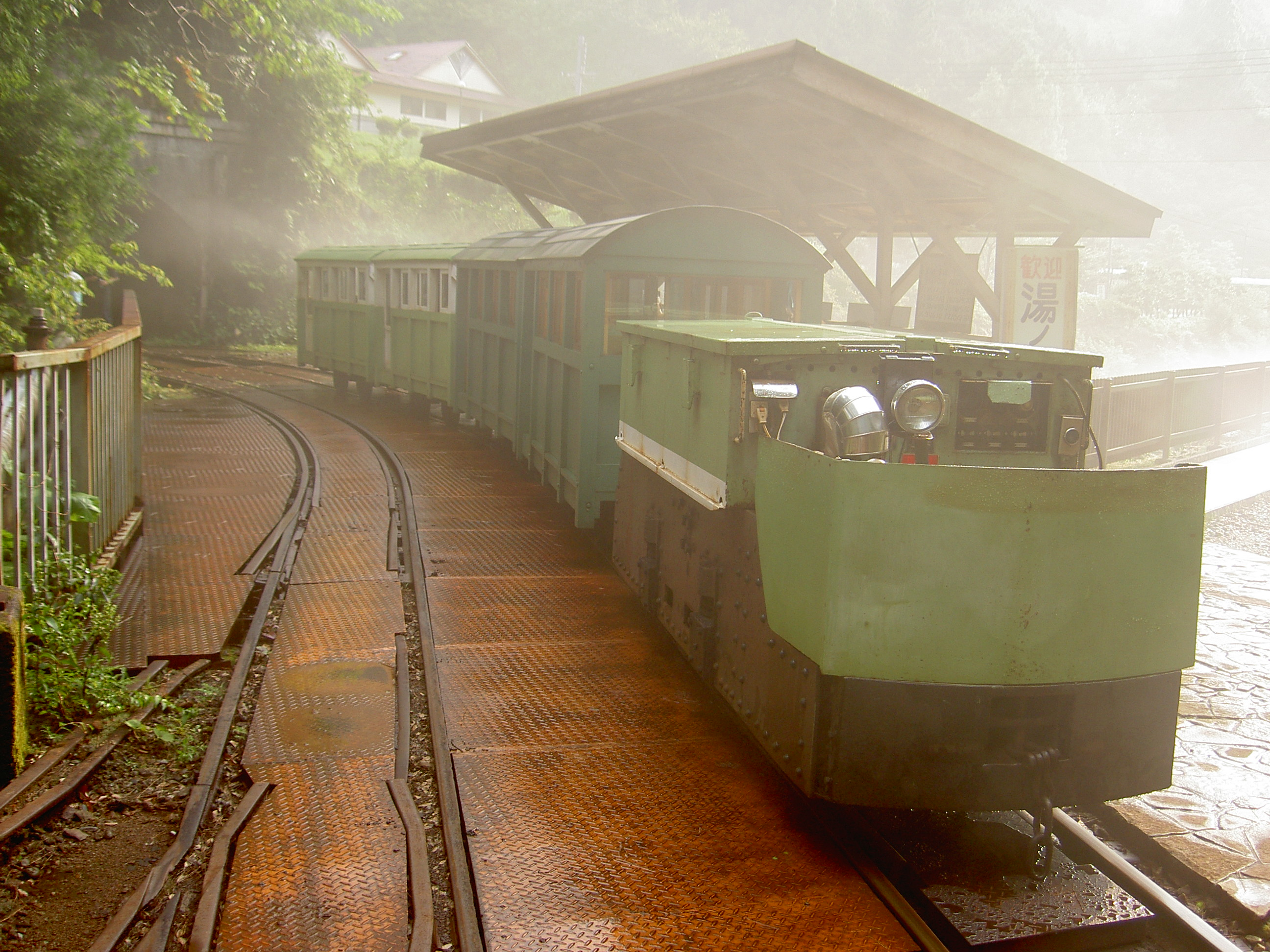 湯の口温泉のトロッコ列車